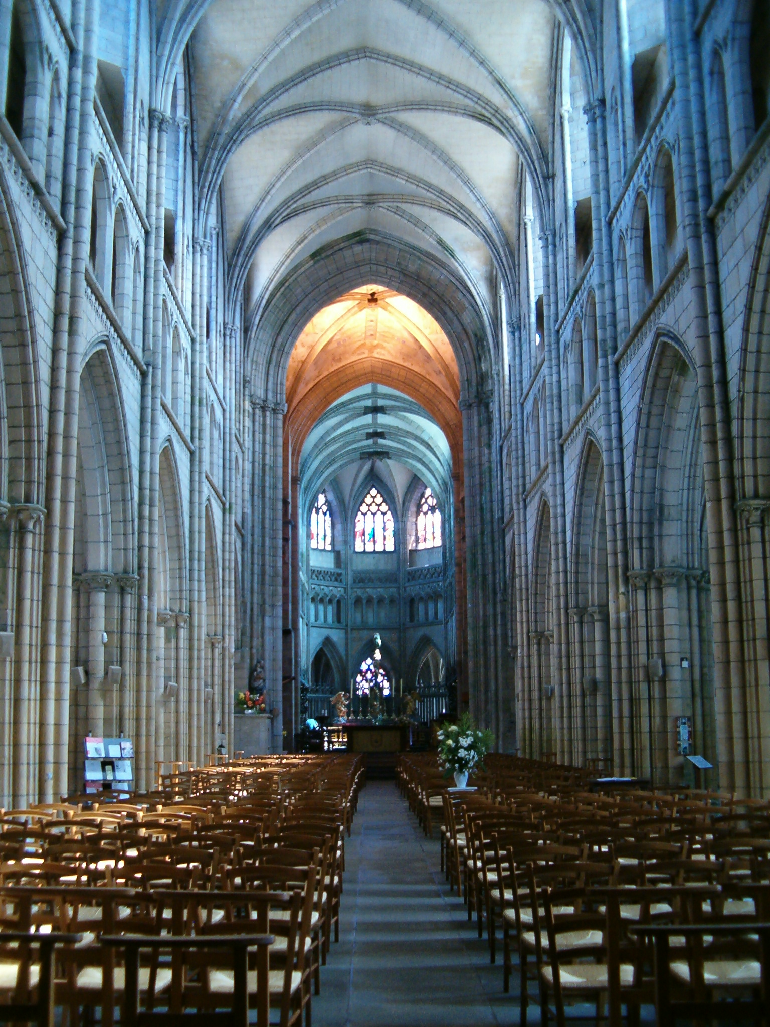 Intérieur de la cathédrale de Saint-Pol-de-Léon